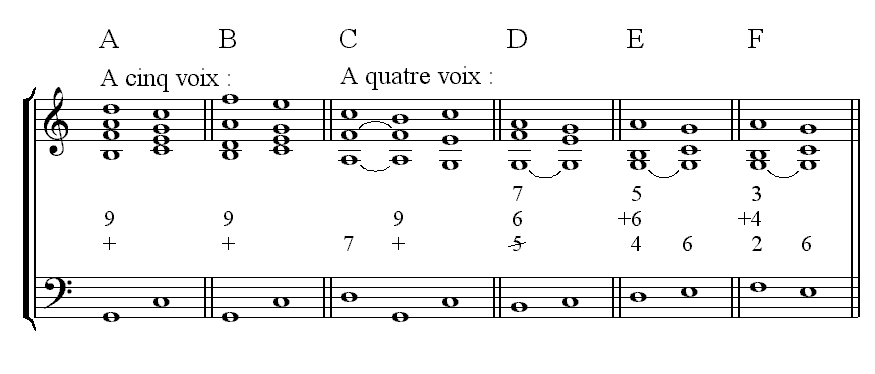 Description : Neuvième majeure de dominante complet - enchaînement ordinaire Source : Personnelle Licence : GFDL